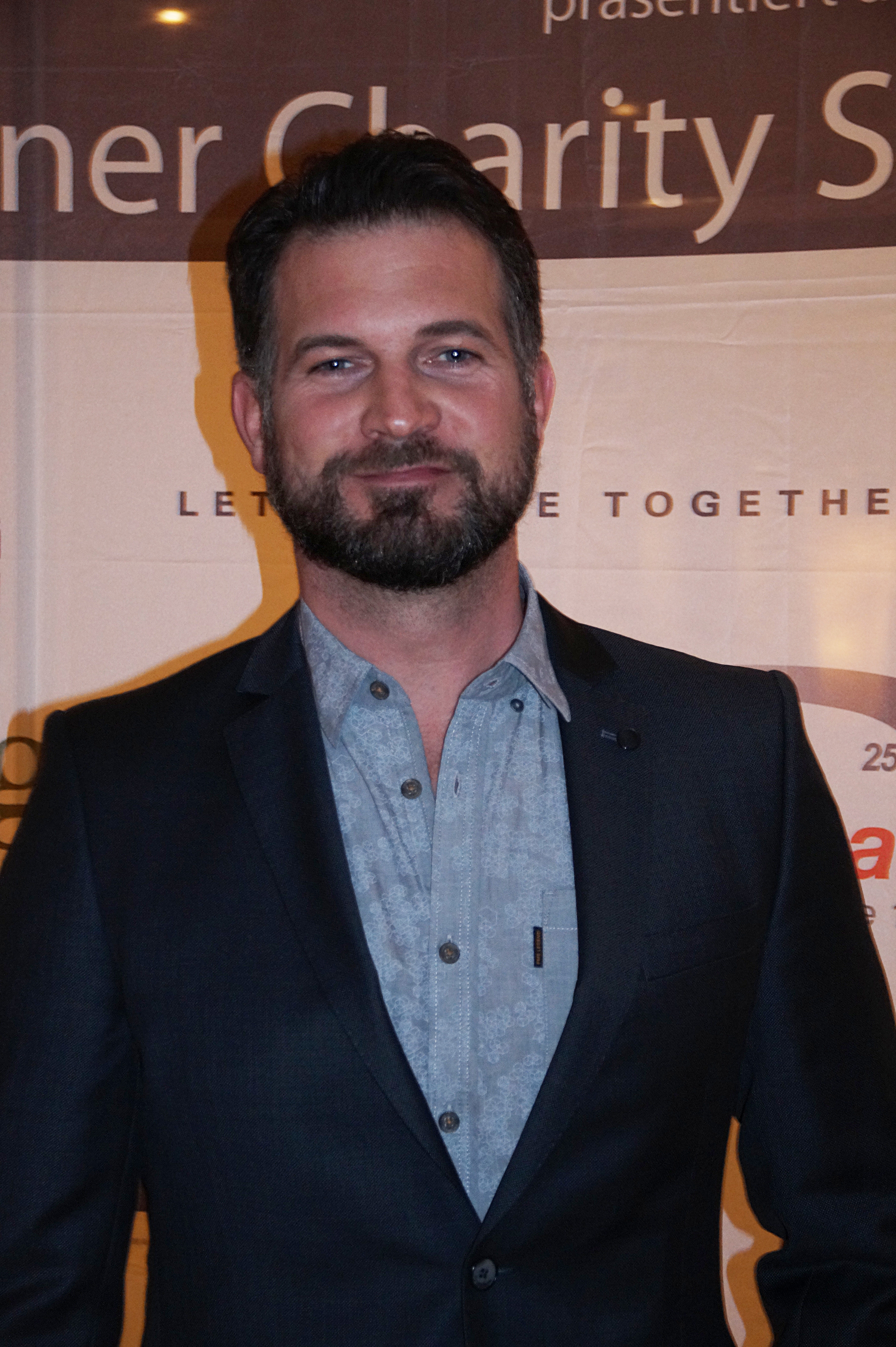 Simon Böer bei der "Kölner Charity Sports Night", am 27.11.2016 im Kölner Dorint Hotel.